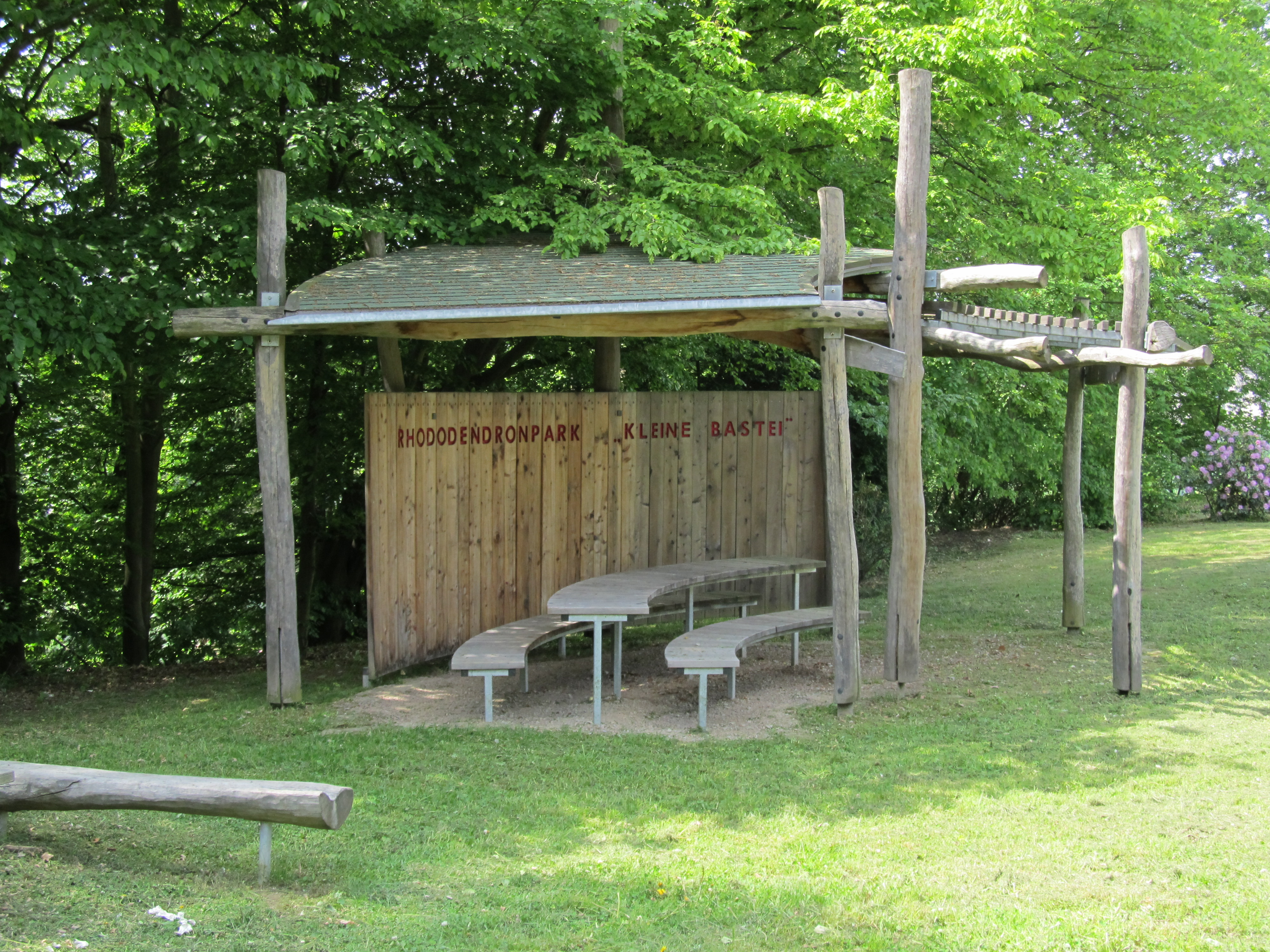 Überdachte Sitzgelegenheit im Rhododendronpark Kleine Bastei in Rathen